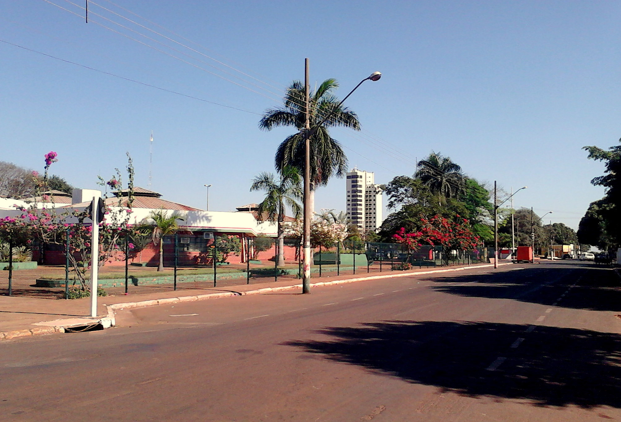 Rua 24, ao lado do Centro Cultural de Tangará da Serra.